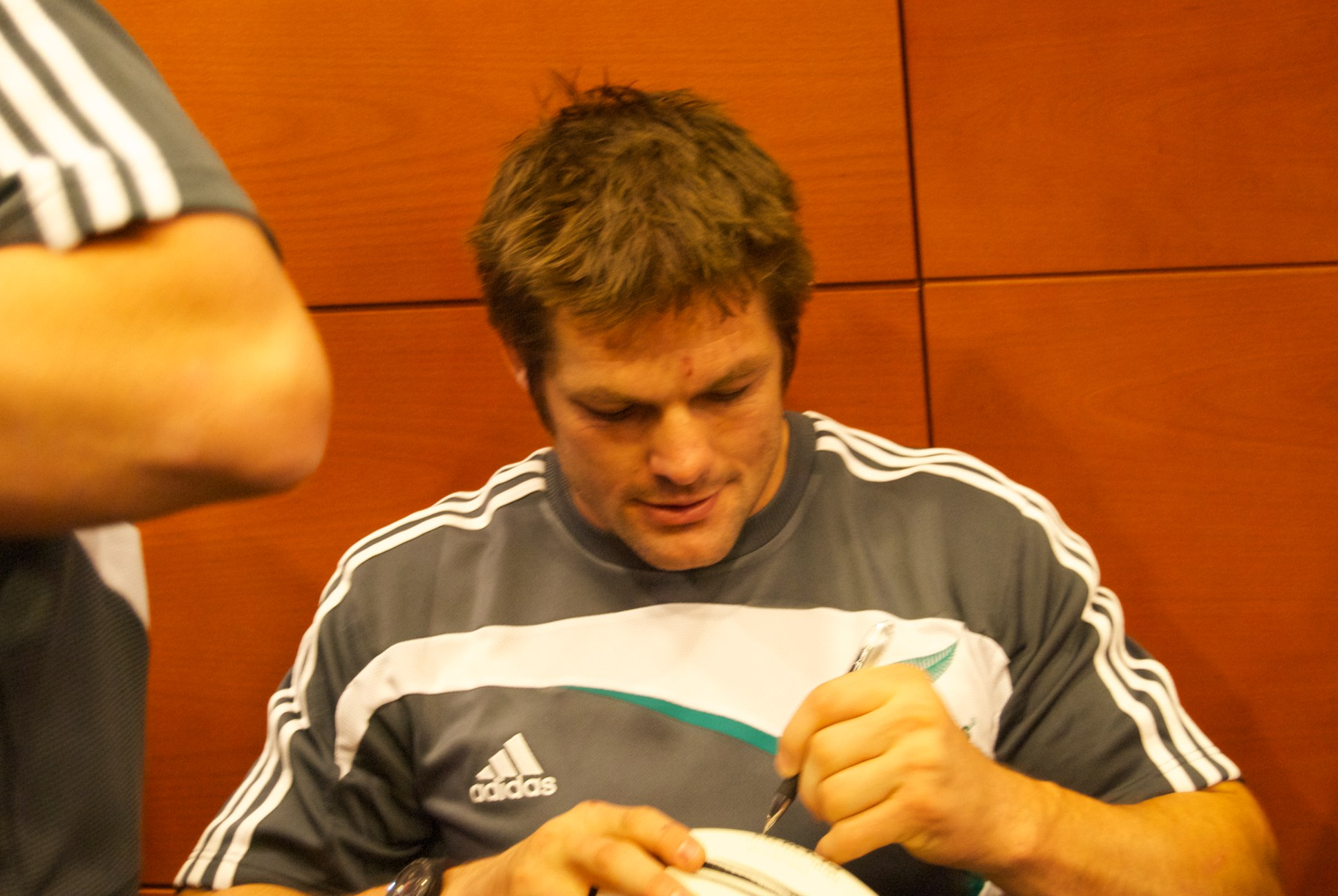 Séance de dédicaces de Richie McCaw.